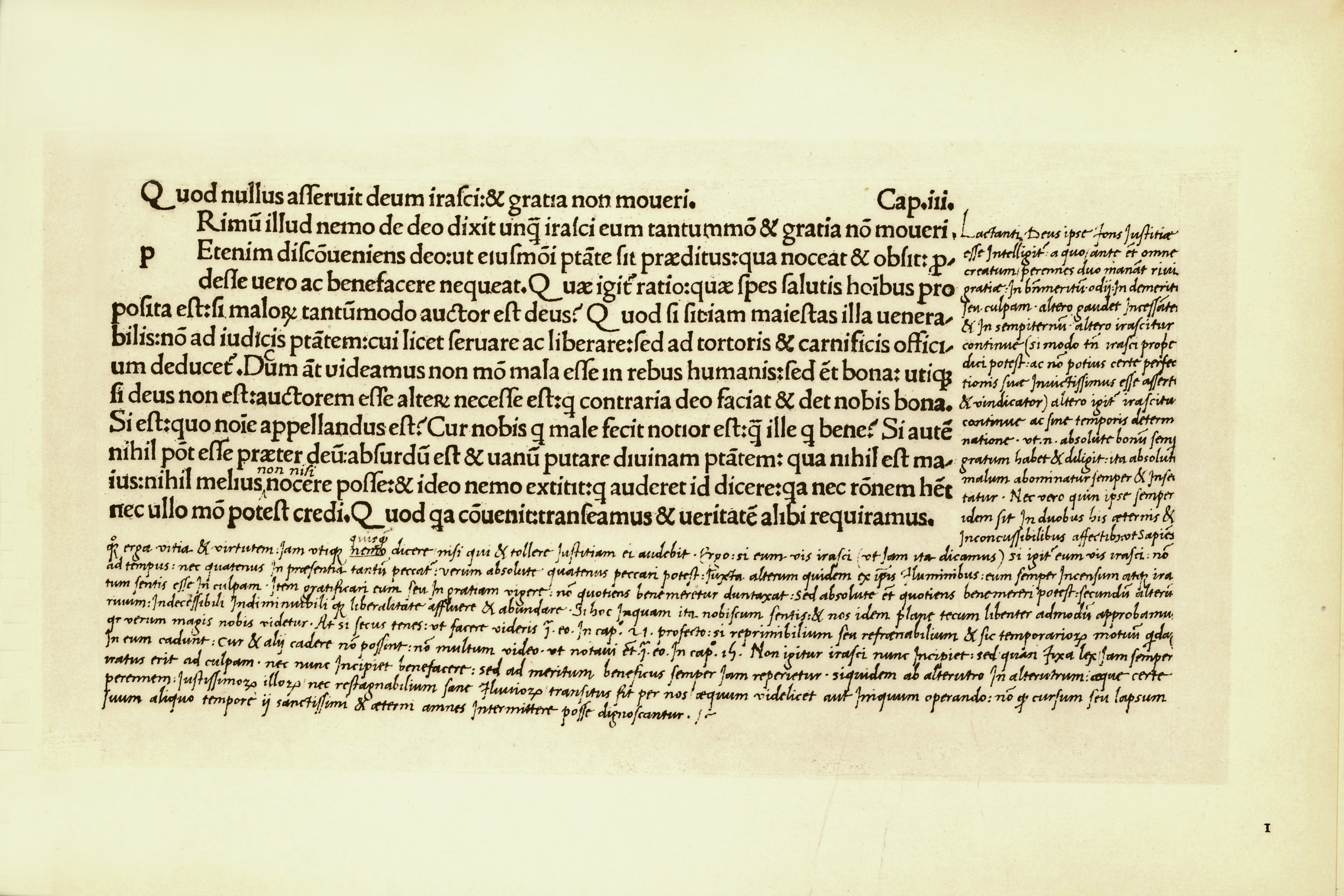 Handschriftliche Randbemerkungen in humanistischer Kursive neben fertig entwickelter Antiqua; aus Lactantius’ De ira Dei